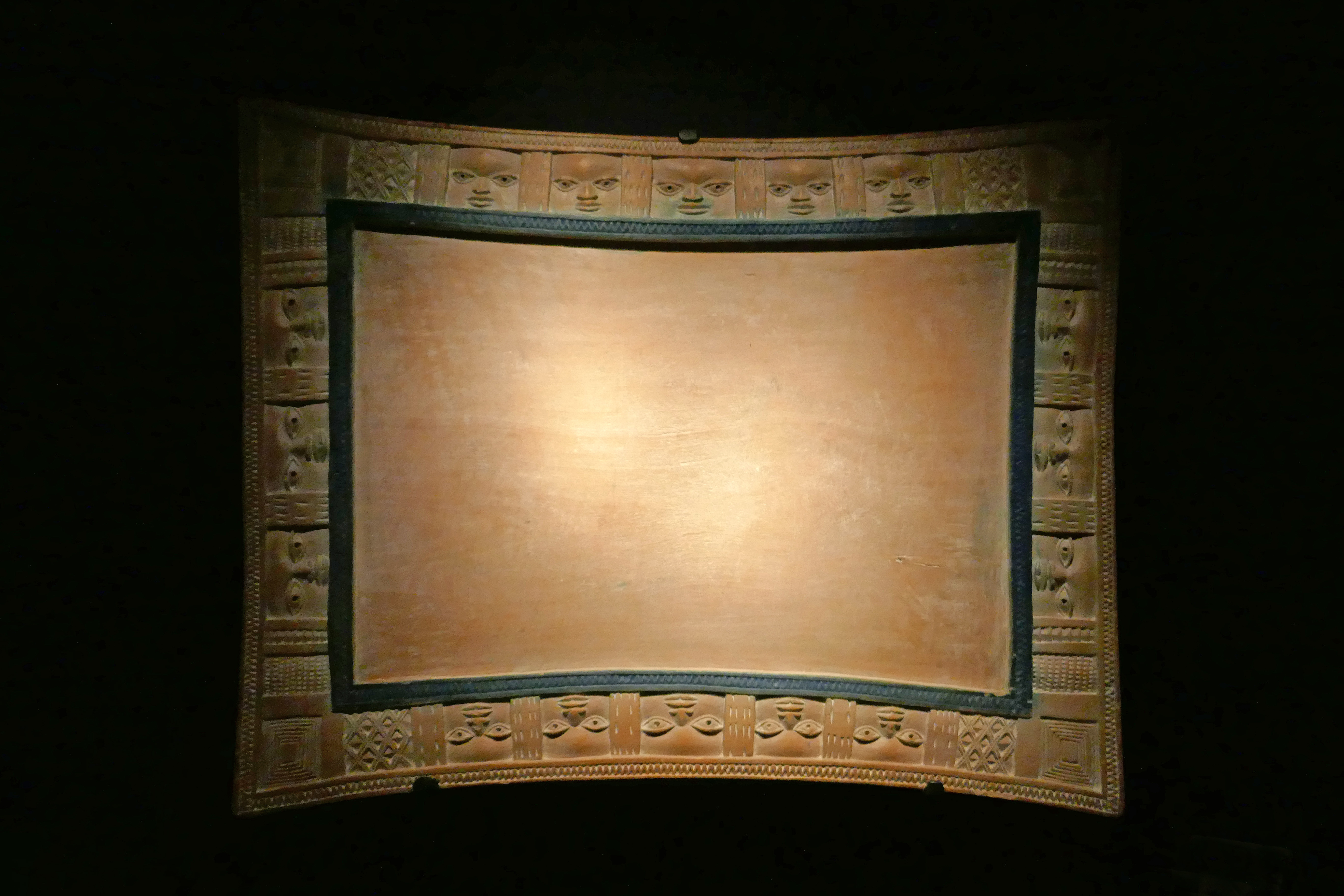 Plateau de divination de Guédégbé Attribué à la famille Houndo Population Fon, style Yoruba Fin du 19e siècle Bois, bleu de lessive Don : Bernard Maupoil Musée du quai Branly N° d'inventaire : 71.1938.17.3